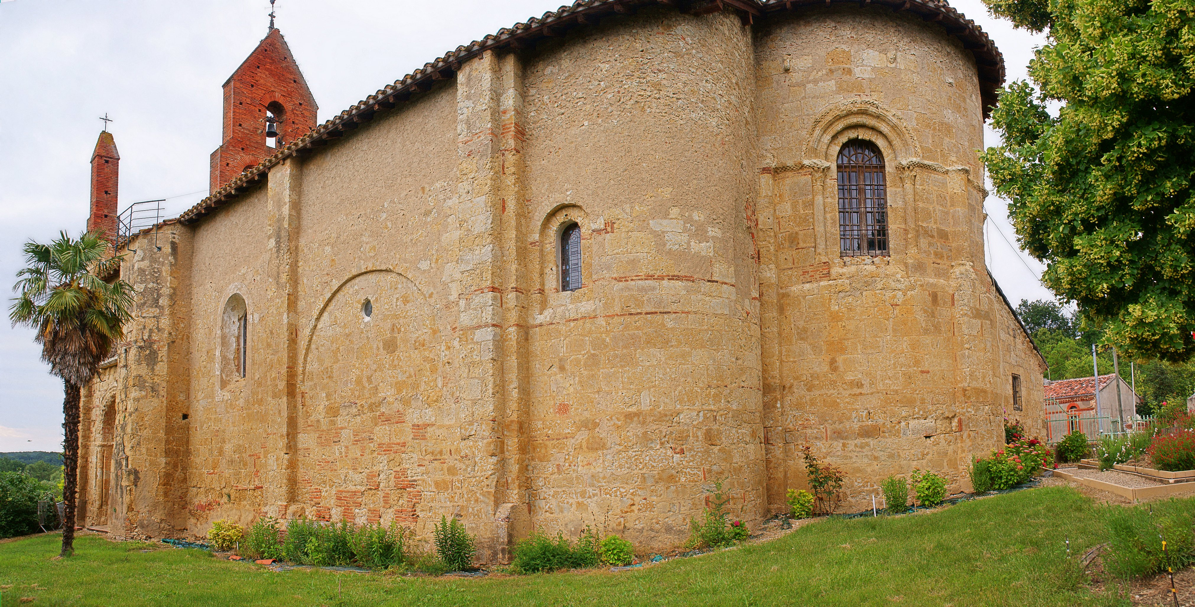 Église romane de Sainte-Suzanne (Ariège)